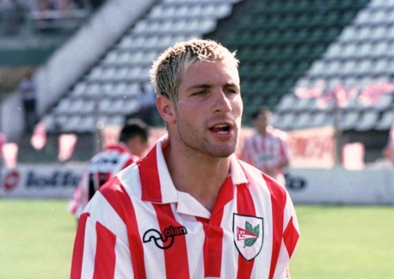 Martín Palermo, con la camiseta de Estudiantes de La Plata, durante su última temporada en ese club.